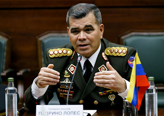 Министр обороны Боливарианской Республики Венесуэла генерал-аншеф Владимир Падрино Лопес во время встречи с Министром обороны Российской Федерации генералом армии Сергеем Шойгу